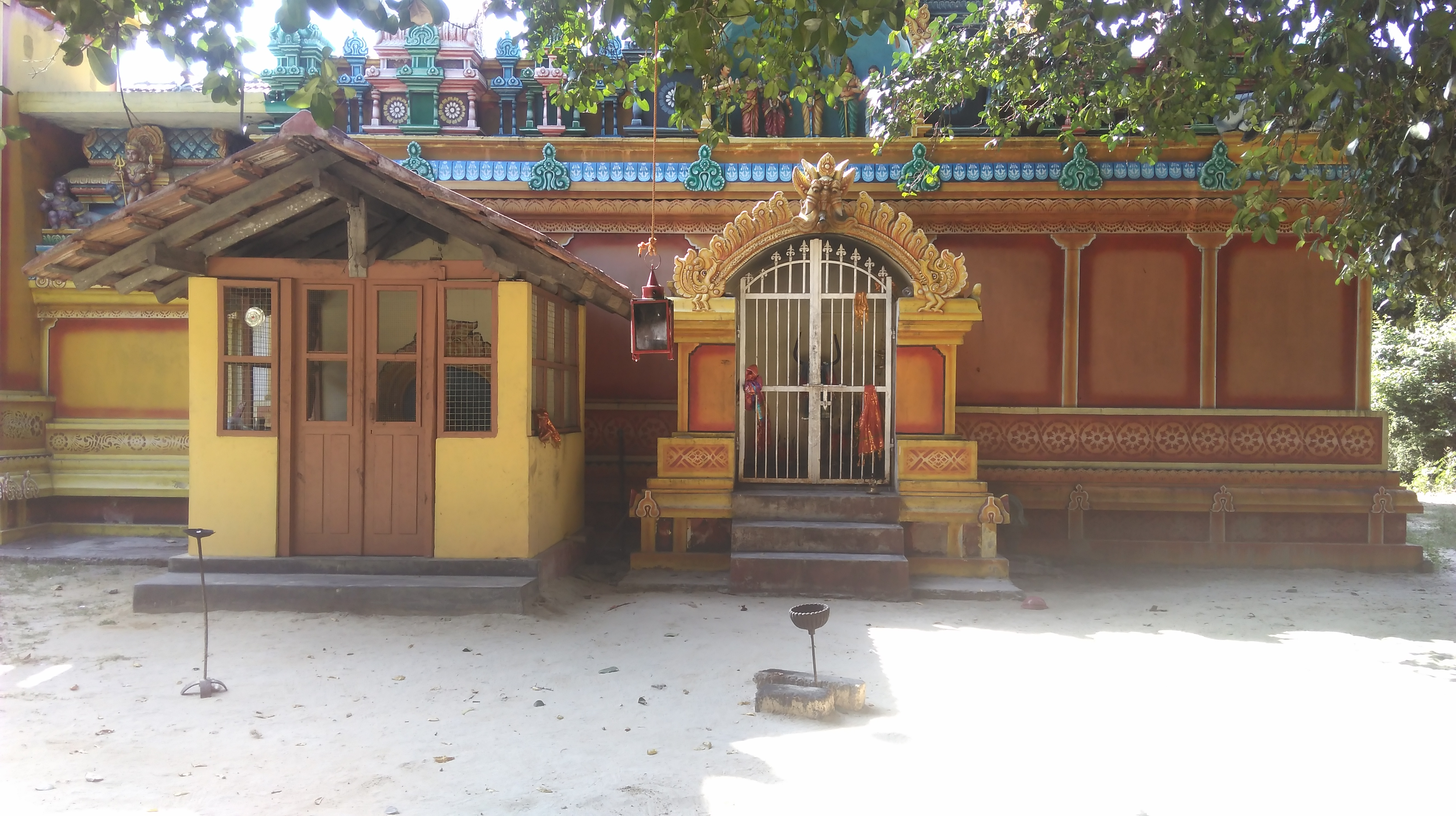 முனீஸ்வரரும் பரிவாரங்களும் விக்கிரகம்